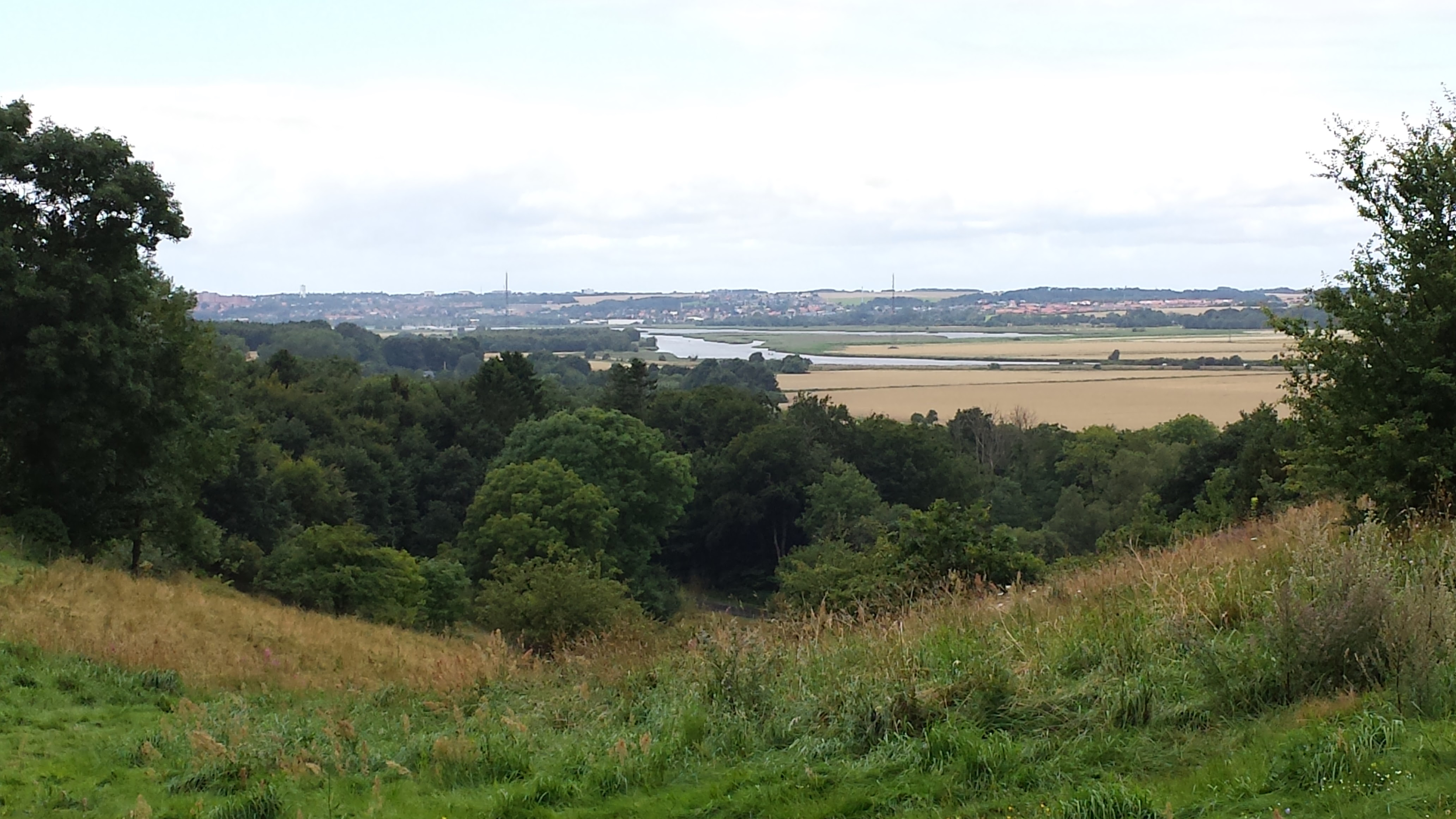 Randers ses i baggrunden.